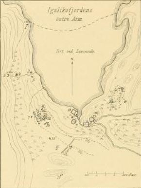 Plan de l'église d'Undir Hofda.